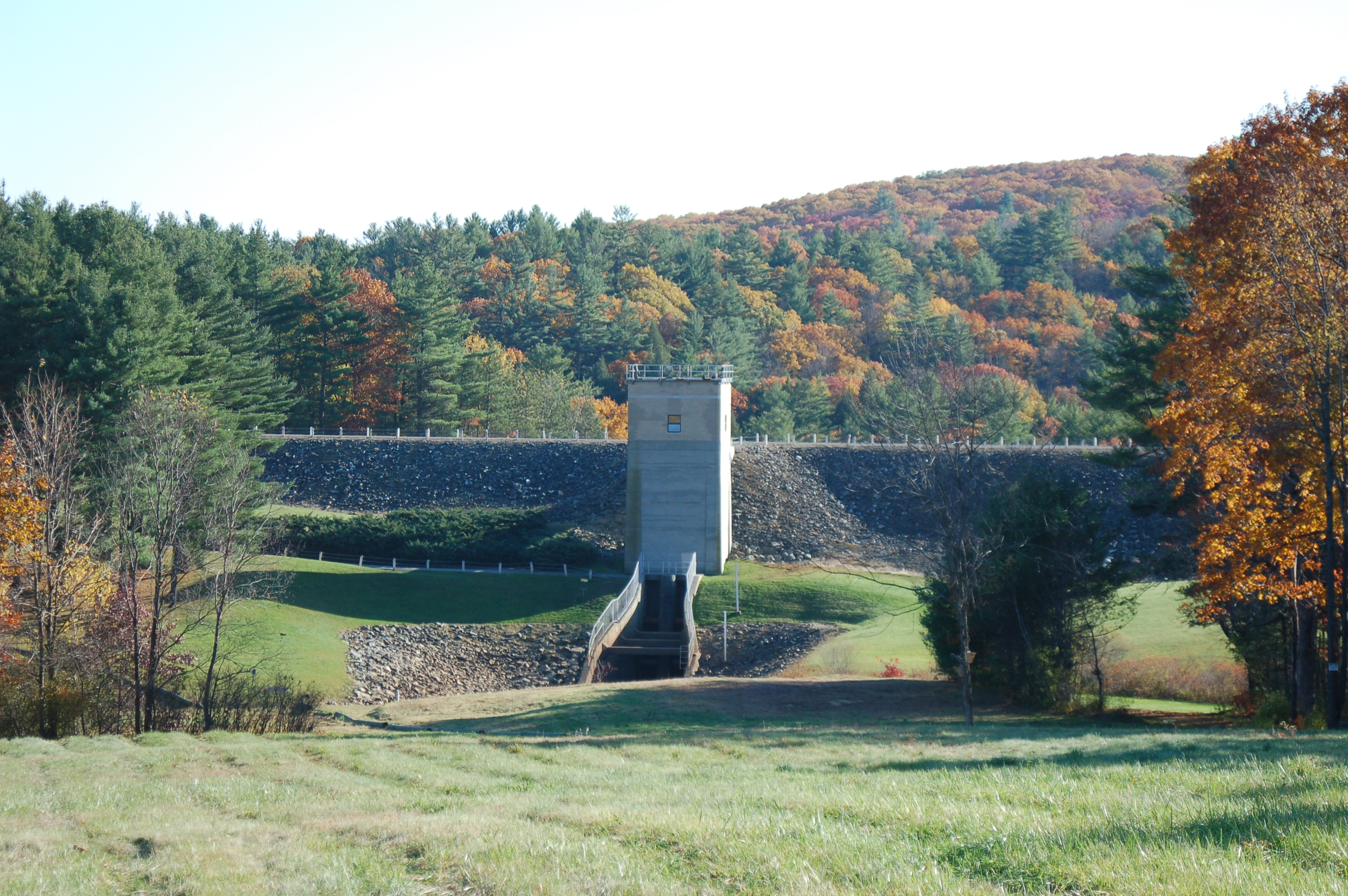 Barre Falls Dam